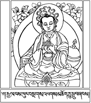 Hình được phép công bố của trang vi: ACIP Thể loại:Đồ tượng Phật giáo